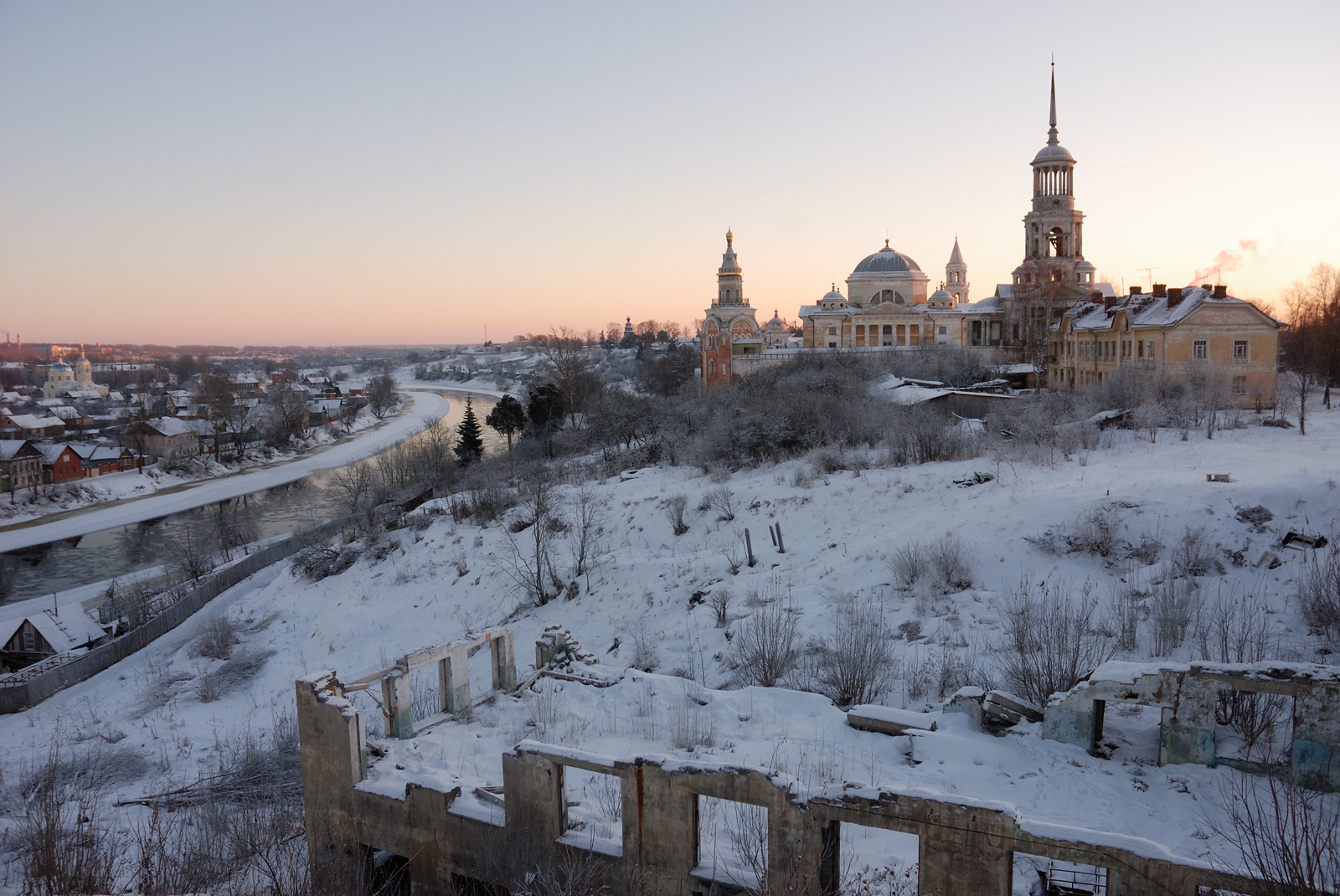 Torzhok, Borisoglebski monastery